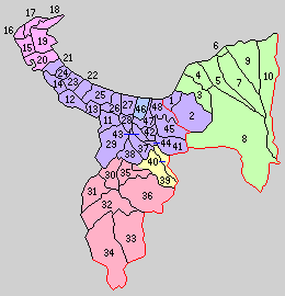 後の鳥取県西伯郡域の町村制時点の町村。